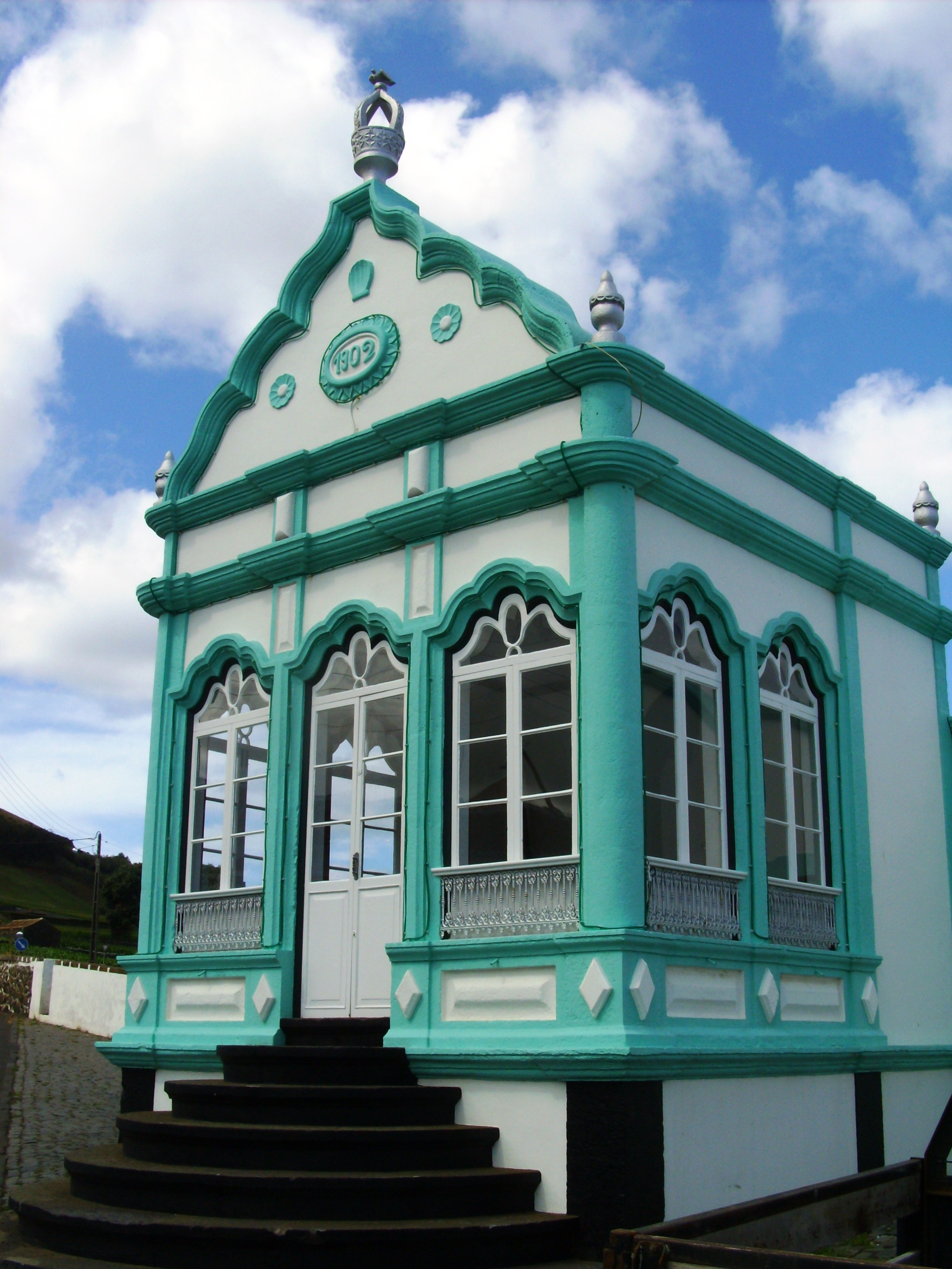 Império do Divino Espírito Santo no largo Comendador Pamplona, Cabo da Praia, Praia da Vitória, Ilha Terceira, Açores.